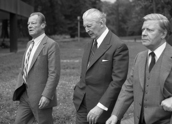 Pflanzung von Kanzler-Gedächtnisbäumen im Park des Palais Schaumburg durch Bundeskanzler Helmut Schmidt und seine Vorgänger Willy Brandt und Kurt-Georg Kiesinger